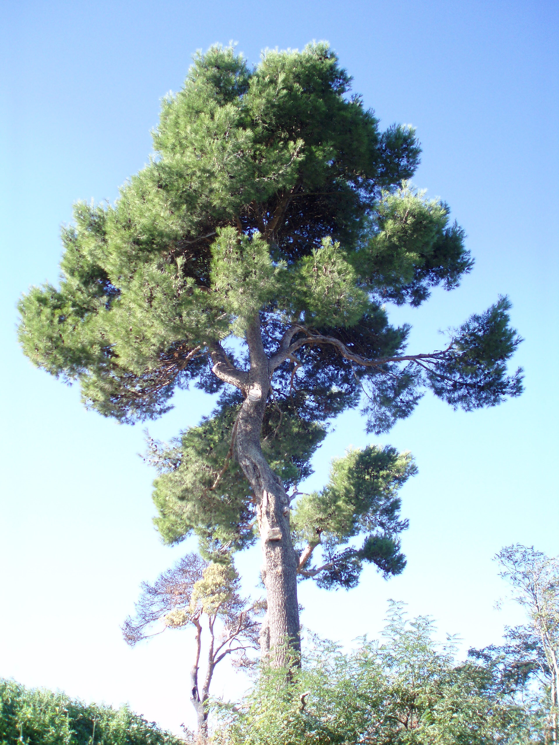 Pino secolare (Pinus halepensis) - Castelleone di Suasa.JPG